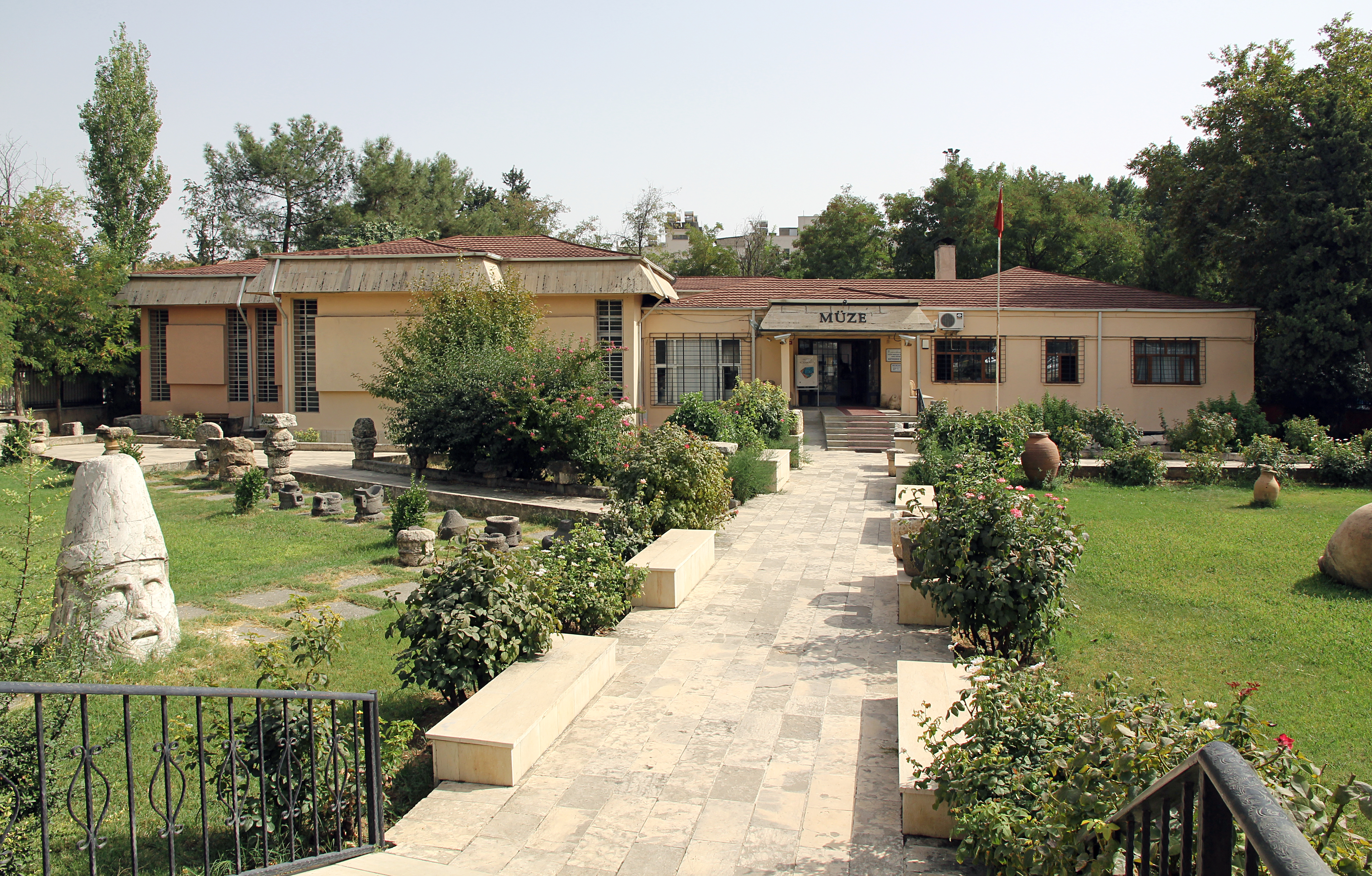 Archäologisches Museum Adıyaman, Türkei